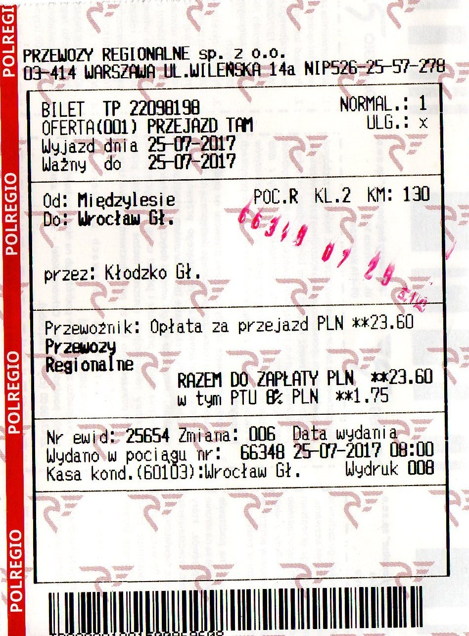 Polski bilet kolejowy.